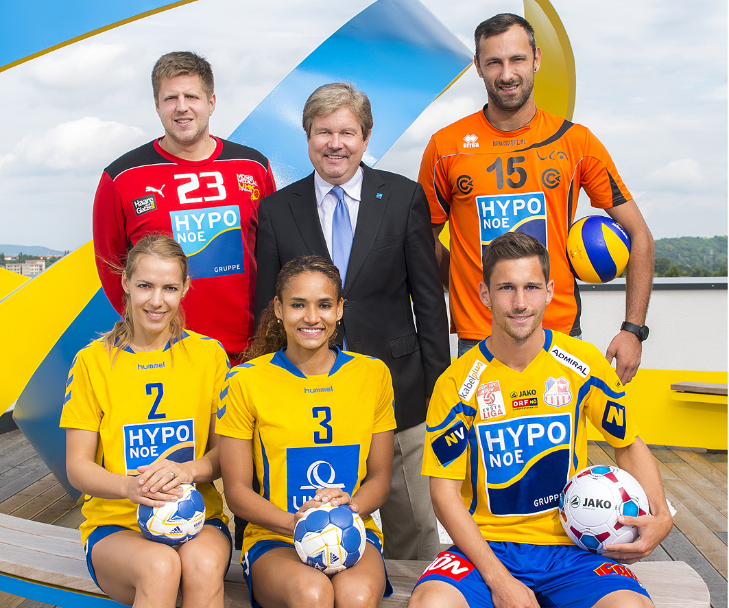 Dr. Peter Harold, Vorstandsvorsitzender HYPO NOE Gruppe, mit Mitgliedern der Hypo Noe Sportfamilie